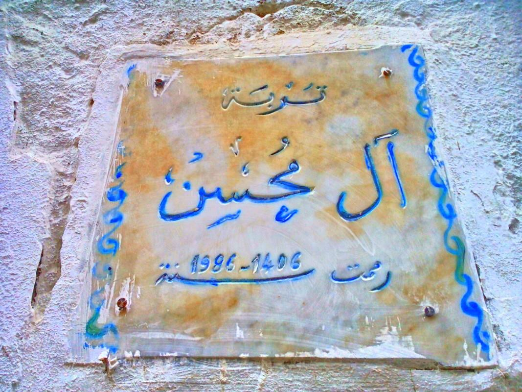 La médina de Tunis مدينة تونس العتيقة